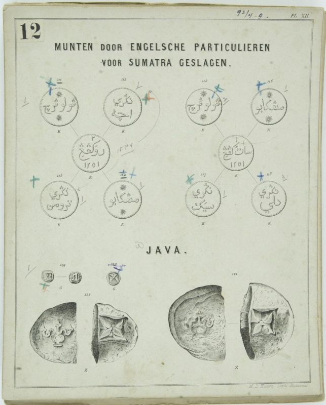 Prent. Door Engelse particulieren voor Sumatra geslagen munten